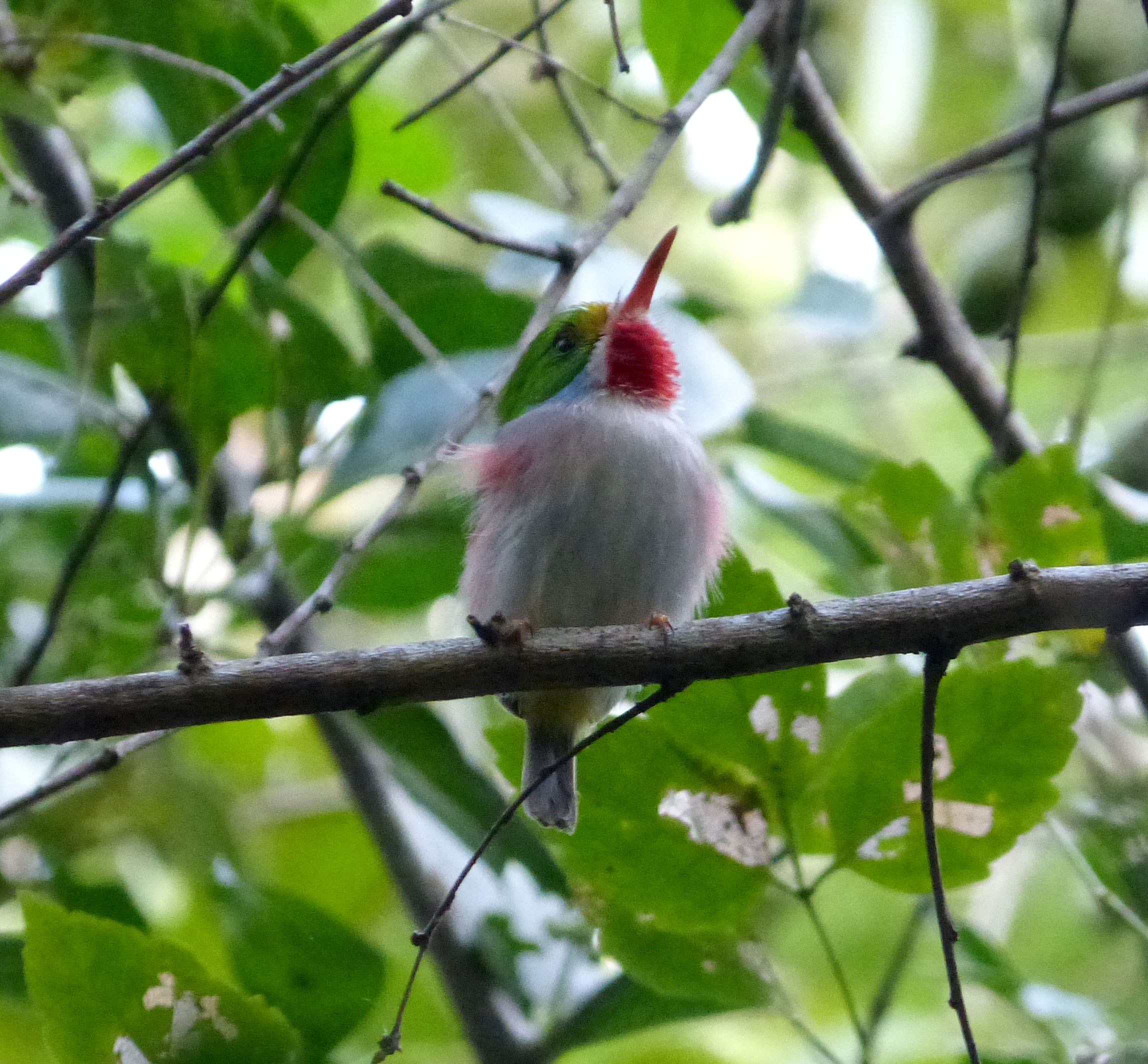 Playa Giron, Zapata area, Cuba